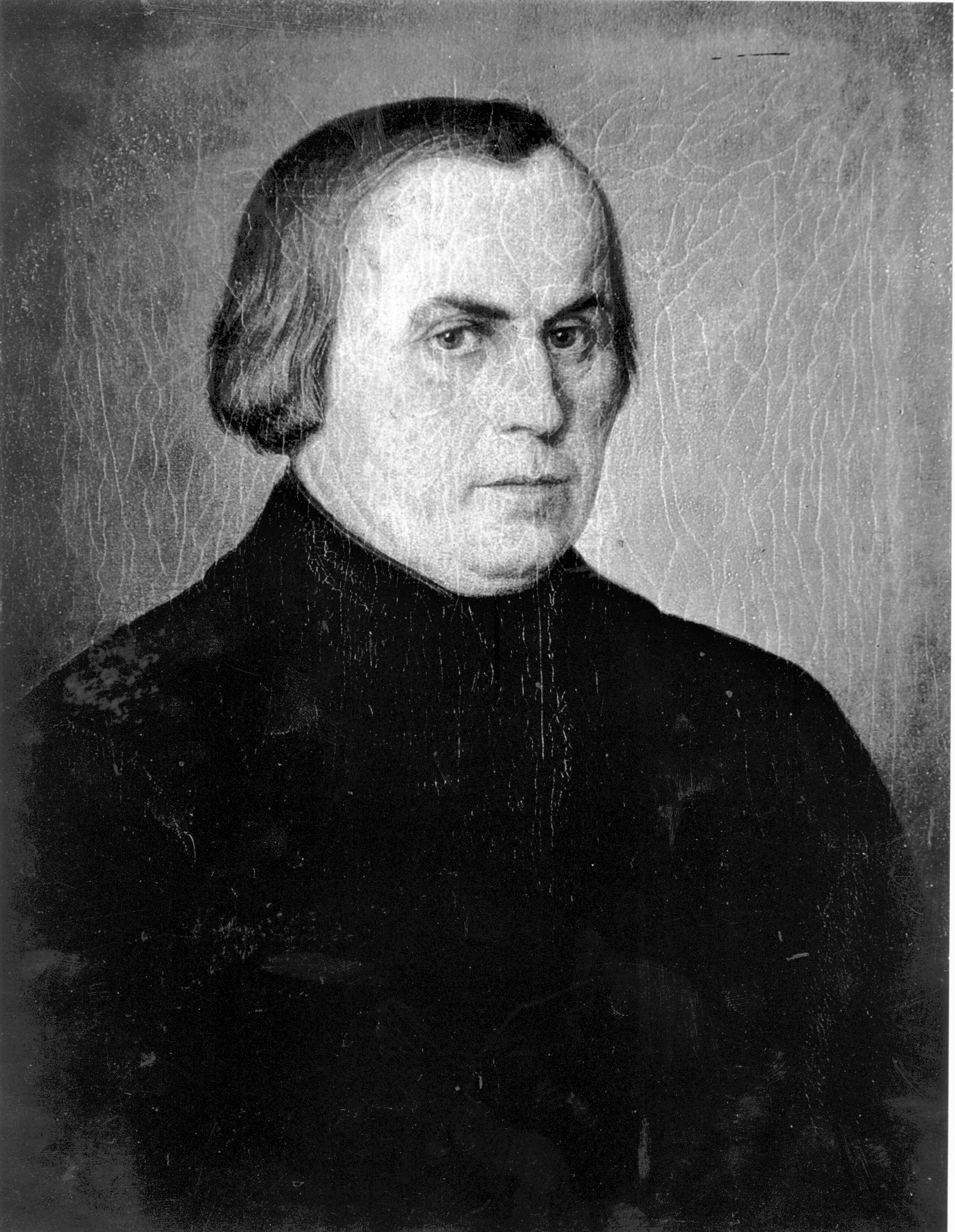 Fotografie des Porträts von Philipp Scheitenberger dem Älteren dem Schultheißen der Stadt Schelklingen von 1847-1874.